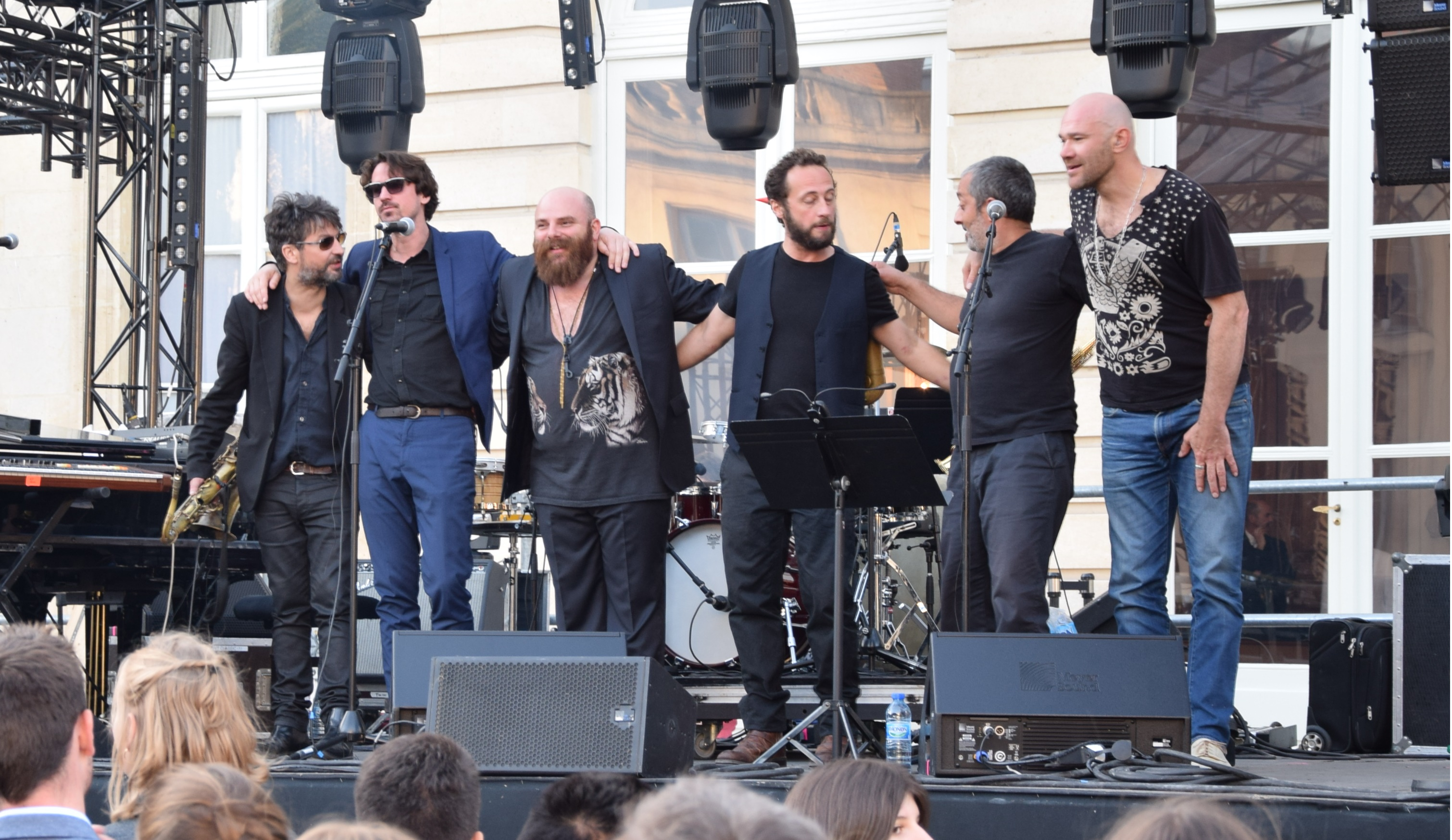 Le saxophoniste Thomas de Pourquery et son groupe Supersonic devant l'hôtel de Lassay à l'occasion de la fête de la musique le 21 juin 2018